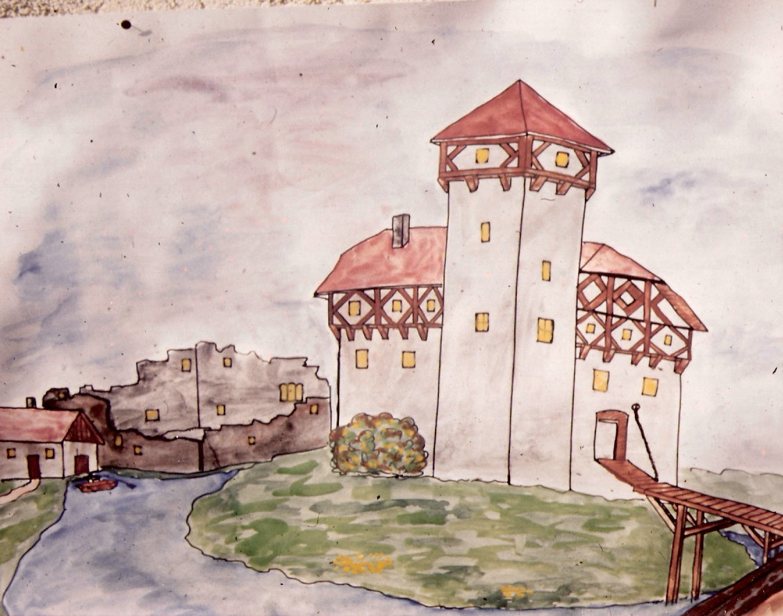 Burg Thannhausen nach 1567,in der Zeit danach wurde sie noch 2 mal abgebrannt.